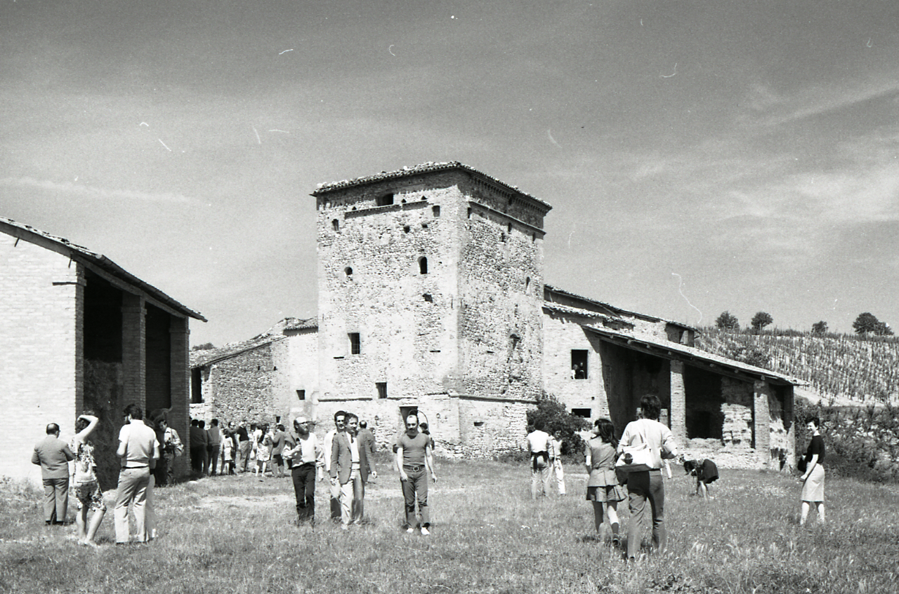 Servizio fotografico : Casalfiumanese, 1971 / Paolo Monti. - Strisce: 7, Fotogrammi complessivi: 37 : Negativo b/n, gelatina bromuro d'argento/ pellicola ; 35 mm. - ((Sul portanegativi: NIKON FP4. - Il fotogramma n. 31 riproduce un ritratto di Monti insieme ad altri uomini. - Occasione: Campagna di rilevamento (quarta) della provincia di Bologna, campagna di rilevamento dell'Appenino imolese. rilevamento della Valle del Santerno. - Fonte: Agenda di Paolo Monti: Leica 1501-3000 Controllo numerazione (1950-1978), presso Archivio Paolo Monti. - Fonte: Fattura di Paolo Monti: IV. Commesse/ Fattura/ Rilevamento fotografico Valle del Santerno (1971/09/03), presso Archivio Paolo Monti. 140 riprese fotografiche con 60 varianti; 235 stampe formato 18x24, 28 stampe formato 50x65 per Mostra Imola